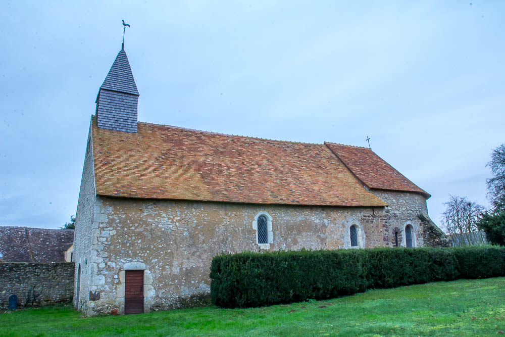 Eglise-Saint-Georges-de-Villedieu